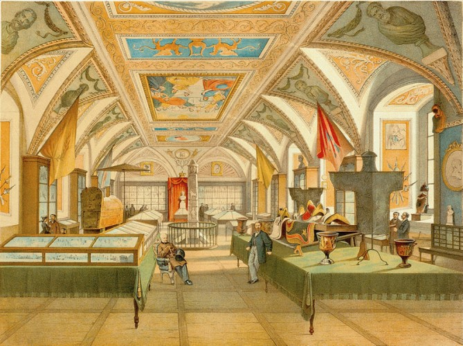 Беларуская (тарашкевіца): Віленскі ўнівэрсытэт